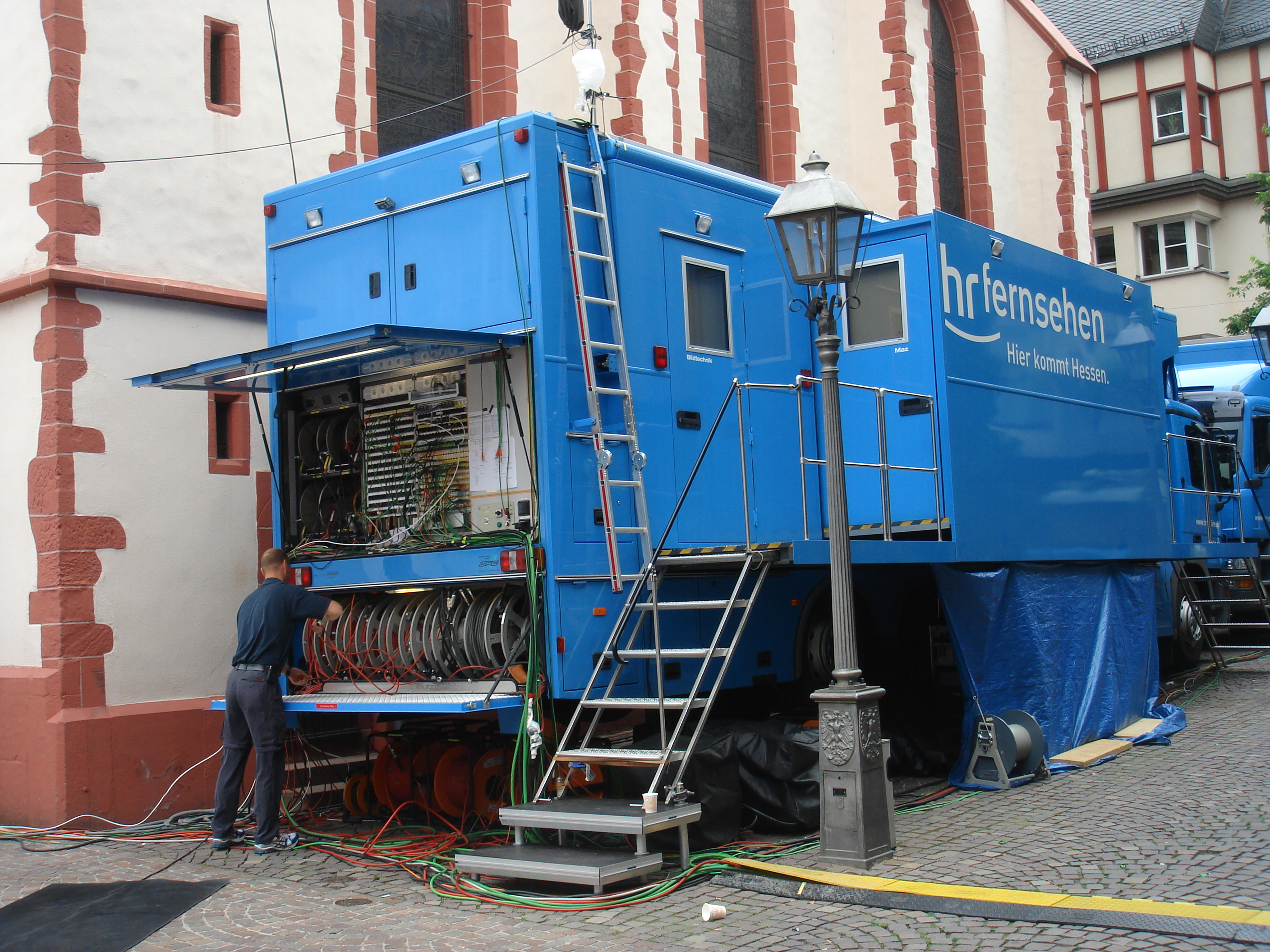 Ü-Wagen, Broadcasting Van beim Ironman Frankfurt 2007